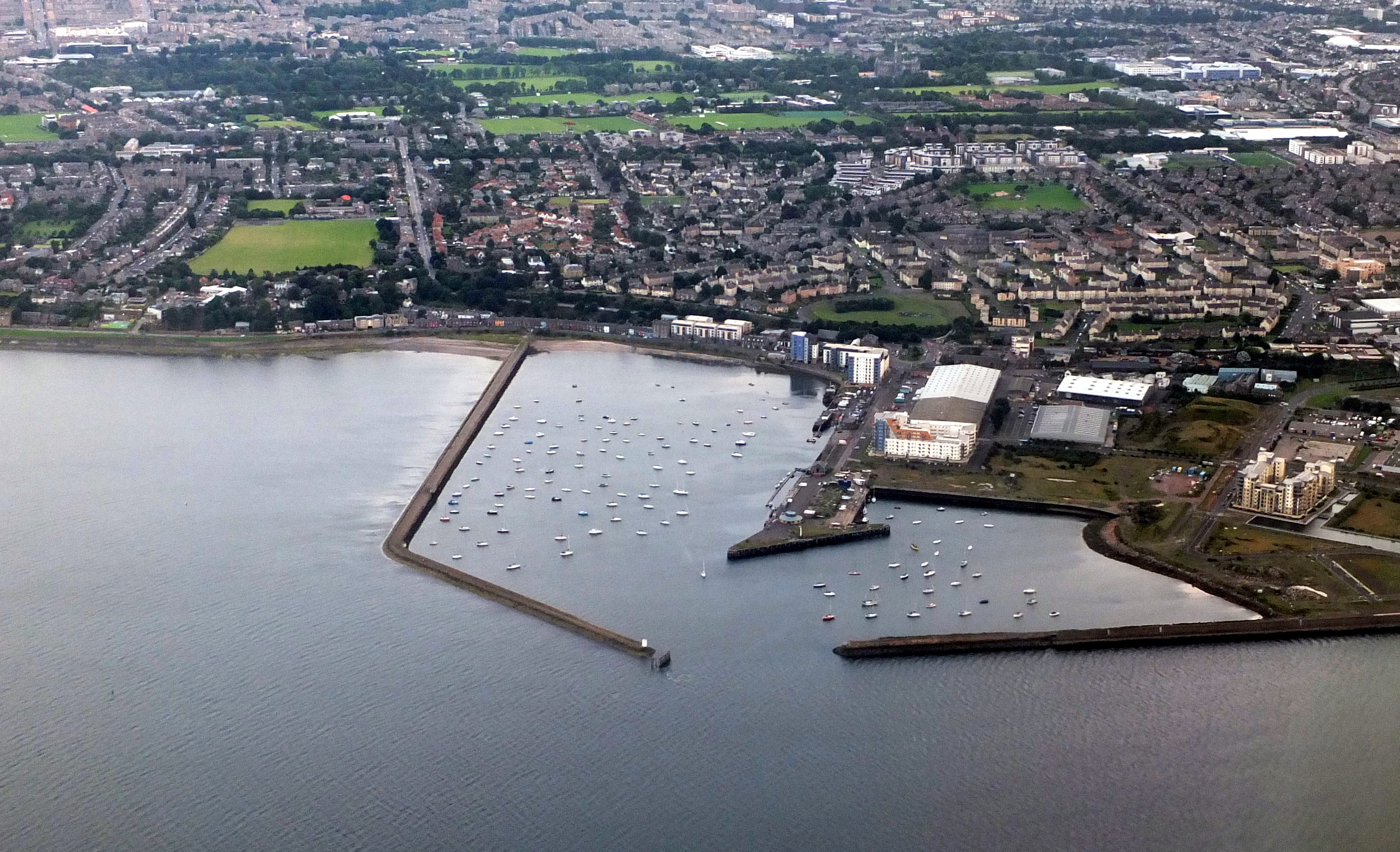 Granton Harbour, Edinburgh.